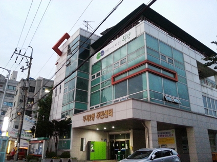 부개2동주민센터. 인천광역시 부평구 부개동 106-45 (도로명주소 : 인천 부평구 동수천로 104 (부개동))